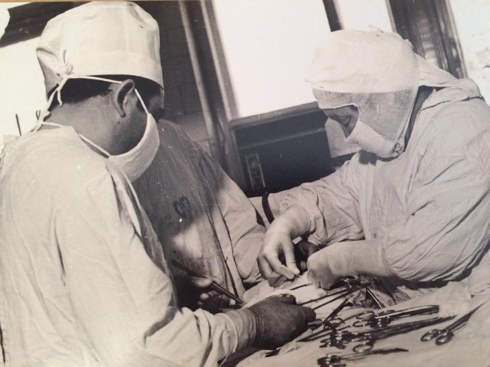 На операции